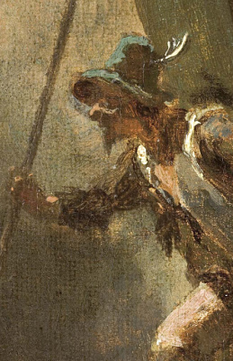 Der Berchtesgadener Hausierer Anton Adner, gemalt von Carl Spitzweg, Detail